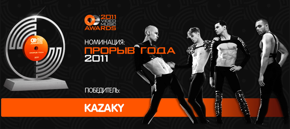 Номинация ПРОРЫВ ГОДА